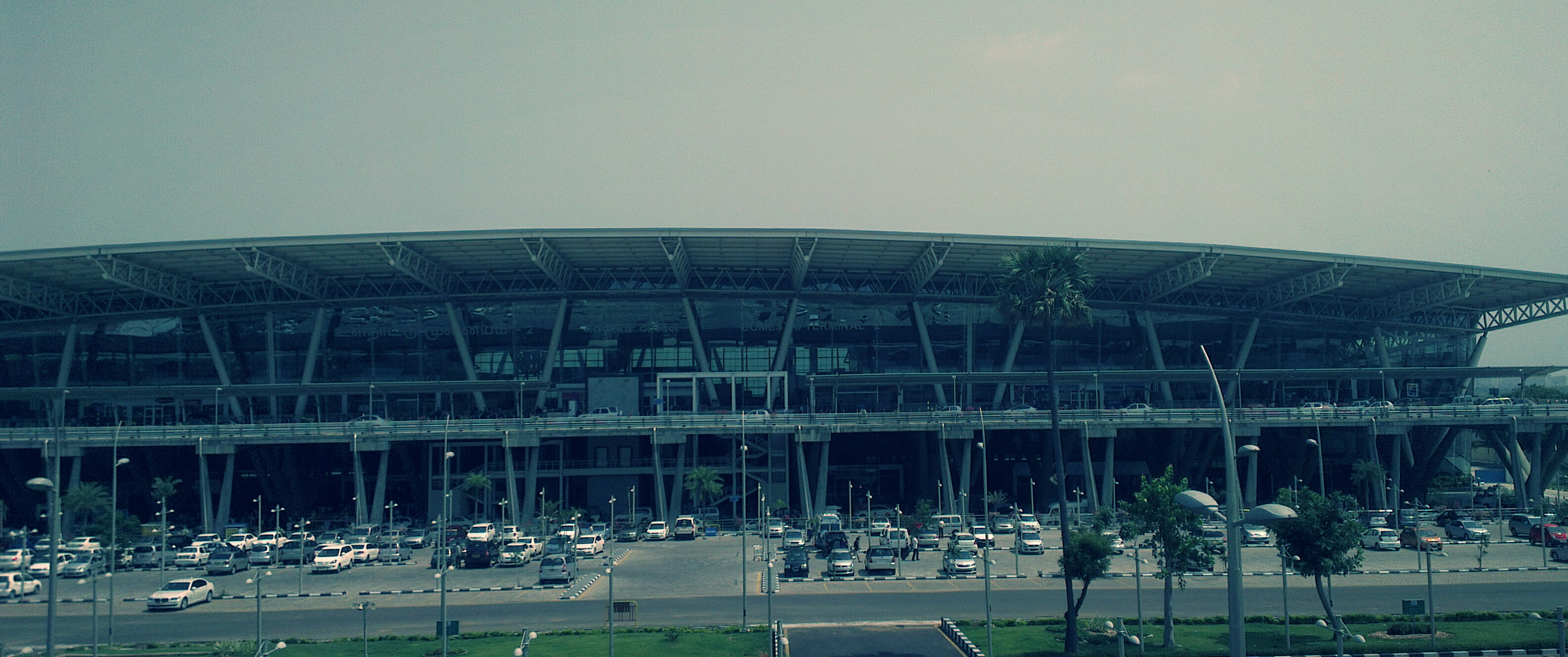 Chennai airport front view